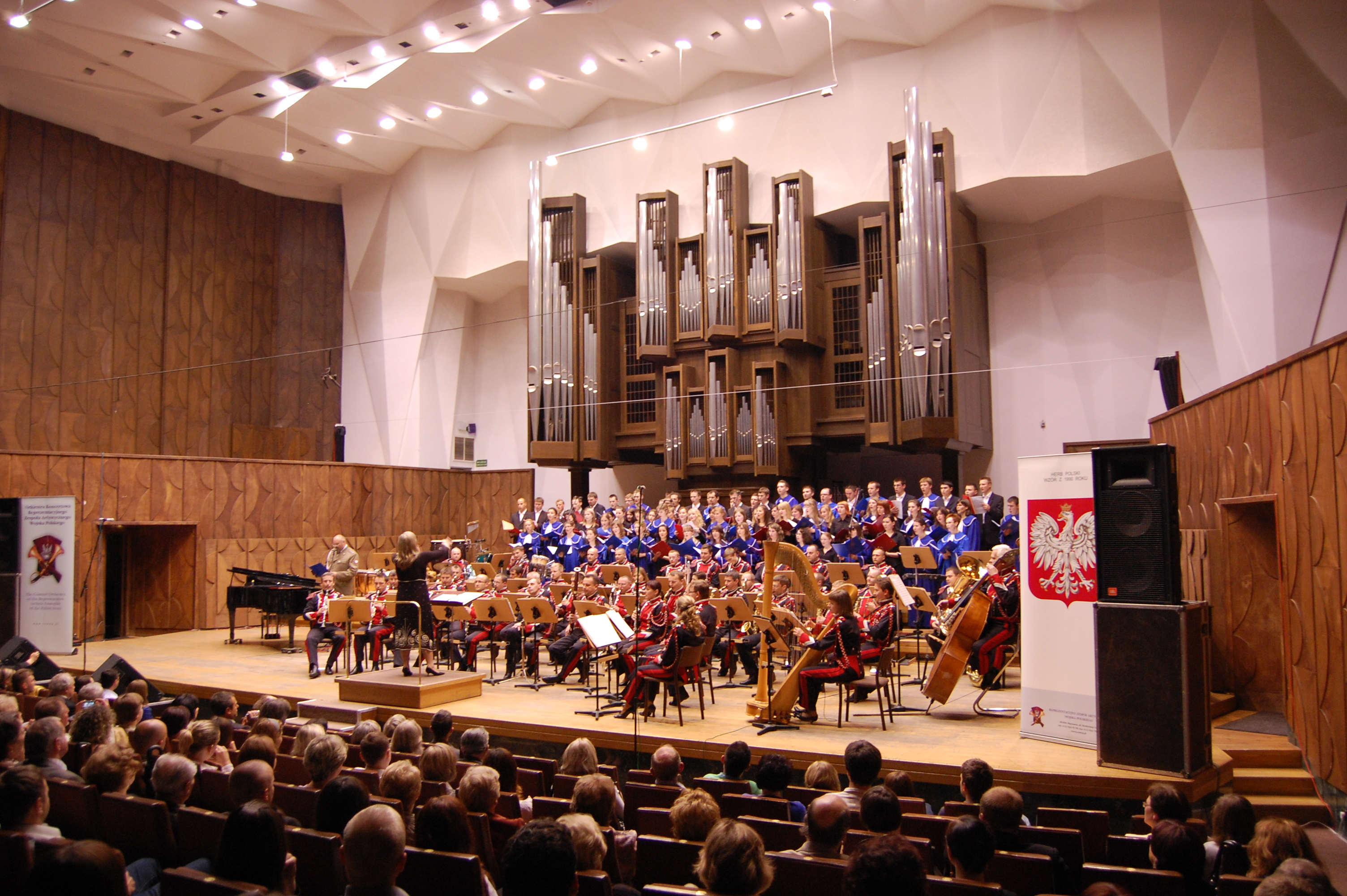 Państwowa Filharmonia im. H. Wieniawskiego w Lublinie. Piąty Maraton Koncertowy „Młodzi Muzycy - Muzykom Seniorom”. Wystąpili: Chór Instytutu Muzyki UMCS w Lublinie, Akademicki Chór Uniwersytetu Medycznego w Lublinie (przygotowanie chórów - Monika Mielko), Aleksandra Bubicz - sopran, Piotr Olech - alt, Piotr Rafałko - tenor, Czesław Gałka - bas, Krystyna Prońko, Aleksandra Dąbrowska, Natalia Wilk, Łukasz Mielko, Wojciech Władek, Tomasz Ośka, Orkiestra Koncertowa Reprezentacyjnego Zespołu Artystycznego Wojska Polskiego; dyrygenci: Monika Mielko, Adam Czajkowski, Grzegorz Mielimąka.